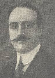 Politico e ministro del Regno d'Italia